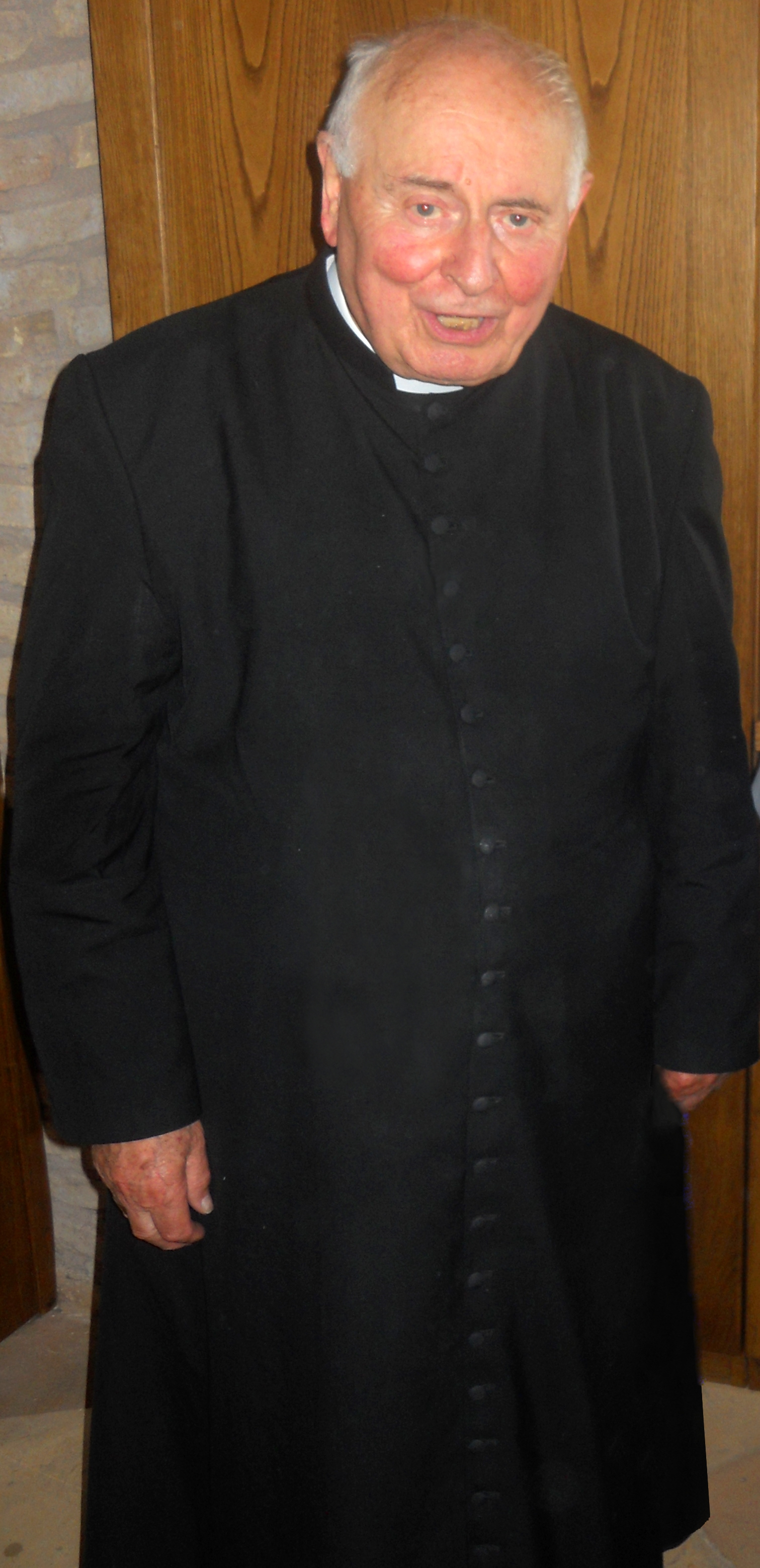 Mons. Ennio Appignanesi, arcivescovo emerito di Potenza-Muro Lucano-Marsico Nuovo